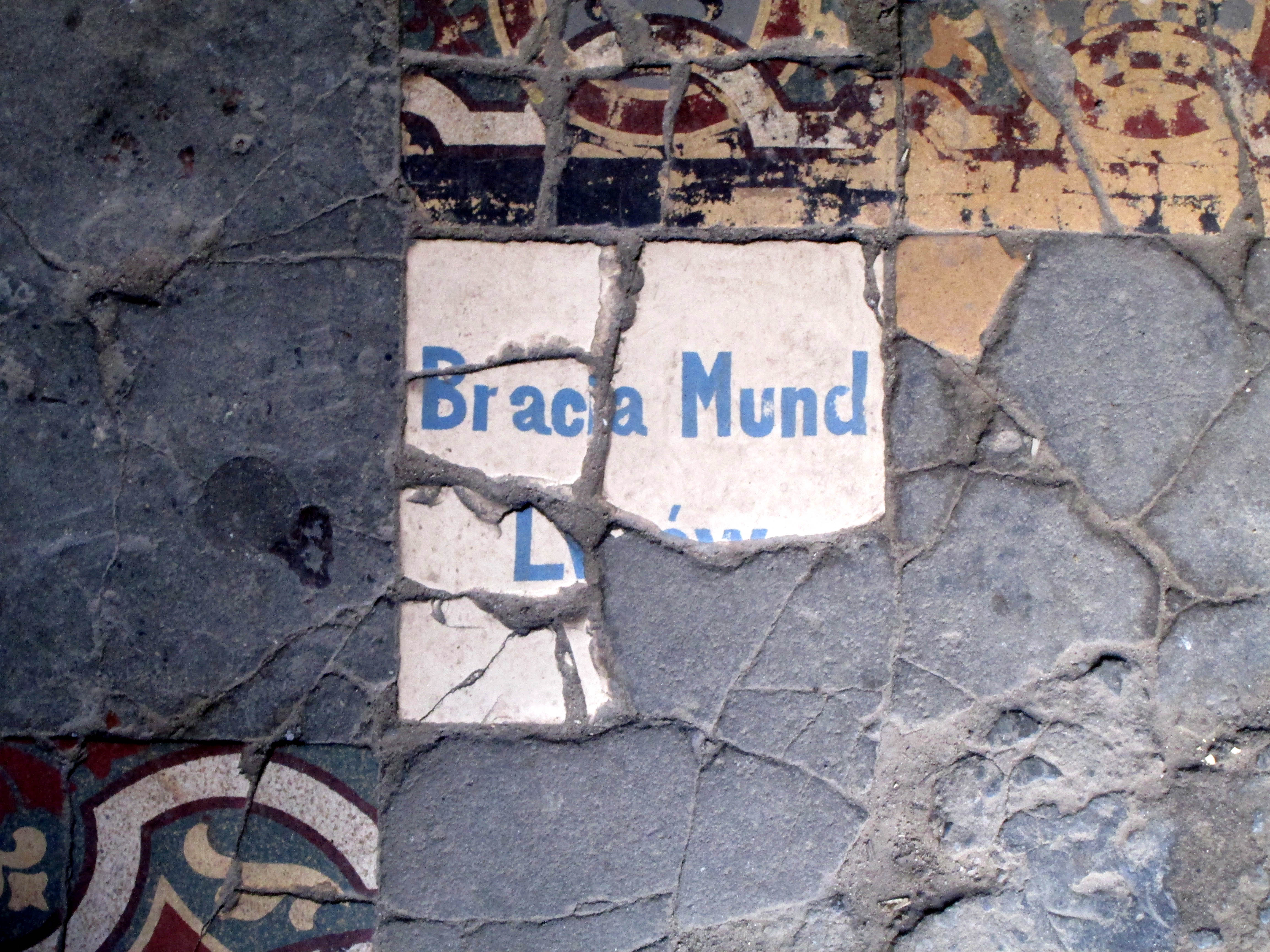 Будинок № 32 на вулиці Дорошенка у Львові